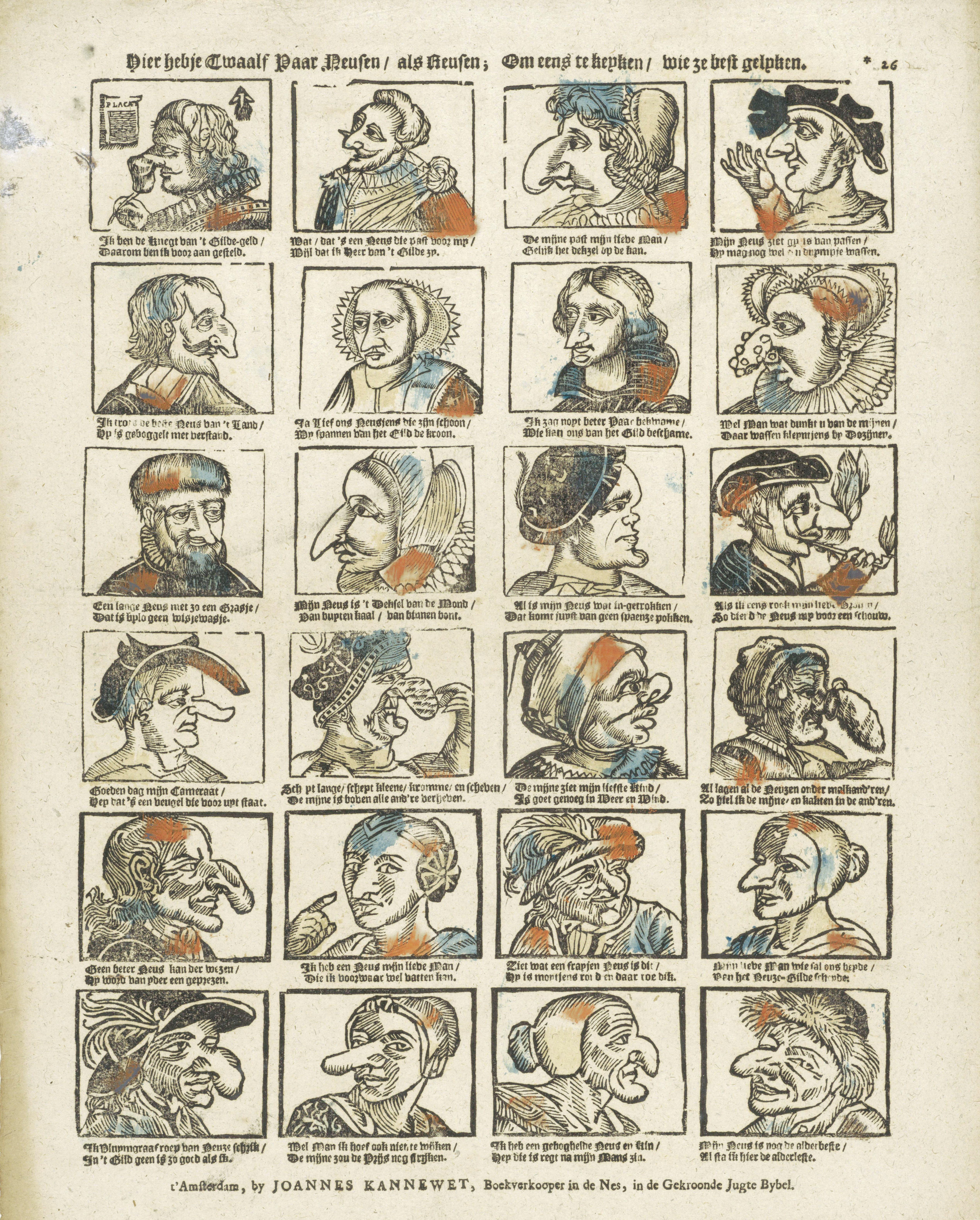 Blad met 24 komische voorstellingen van figuren met grote en misvormde neuzen. Onder elke afbeelding een tweeregelig vers. . h 390 mm × w 315 mm